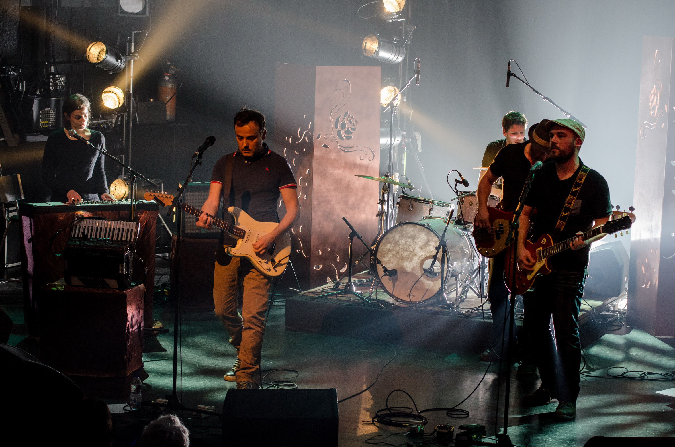 Mickey 3d aux Pénitents, à Montbrison, mars 2016.